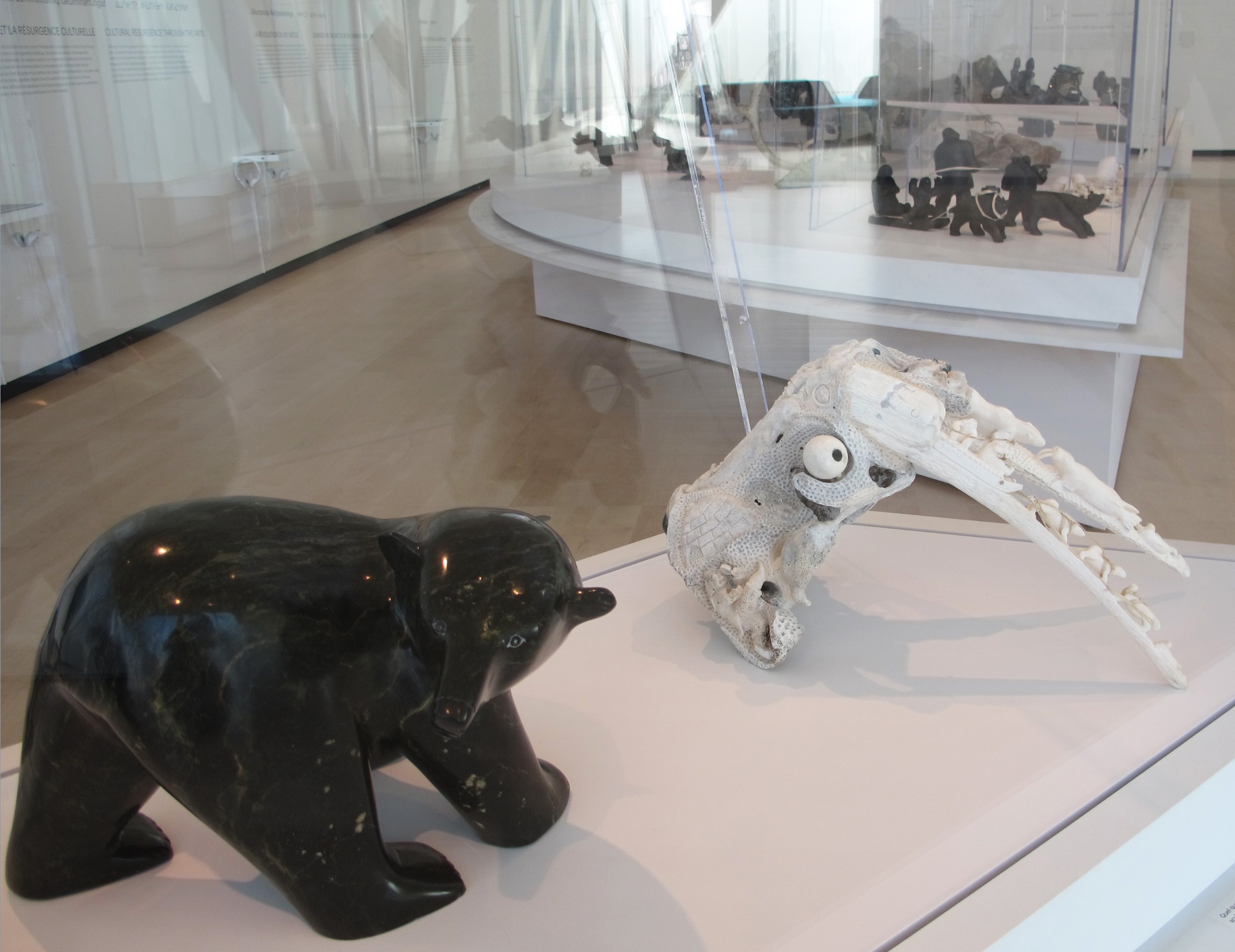 Salle de la collection d’art inuit Brousseau, Musée national des beaux-arts du Québec, pavillon Pierre-Lassonde, Québec, Canada.